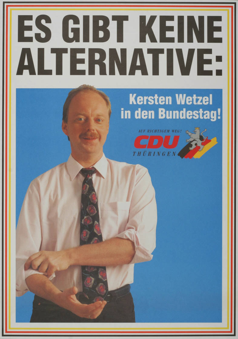 Es gibt keine Alternative: Kersten Wetzel in den Bundestag! Auf richtigem Weg! CDU Thüringen Abbildung: Foto - Nationalfarben Plakatart: Kandidaten-/Personenplakat mit Porträt Objekt-Signatur: 10-001: 4033 Bestand: Plakate zu Bundestagswahlen (10-001) GliederungBestand10-18: Plakate zu Bundestagswahlen (10-001) » Die 13. Bundestagswahl am 16. Oktober 1994 » CDU » Mit Porträtfoto Lizenz: KAS/ACDP 10-001: 4033 CC-BY-SA 3.0 DE